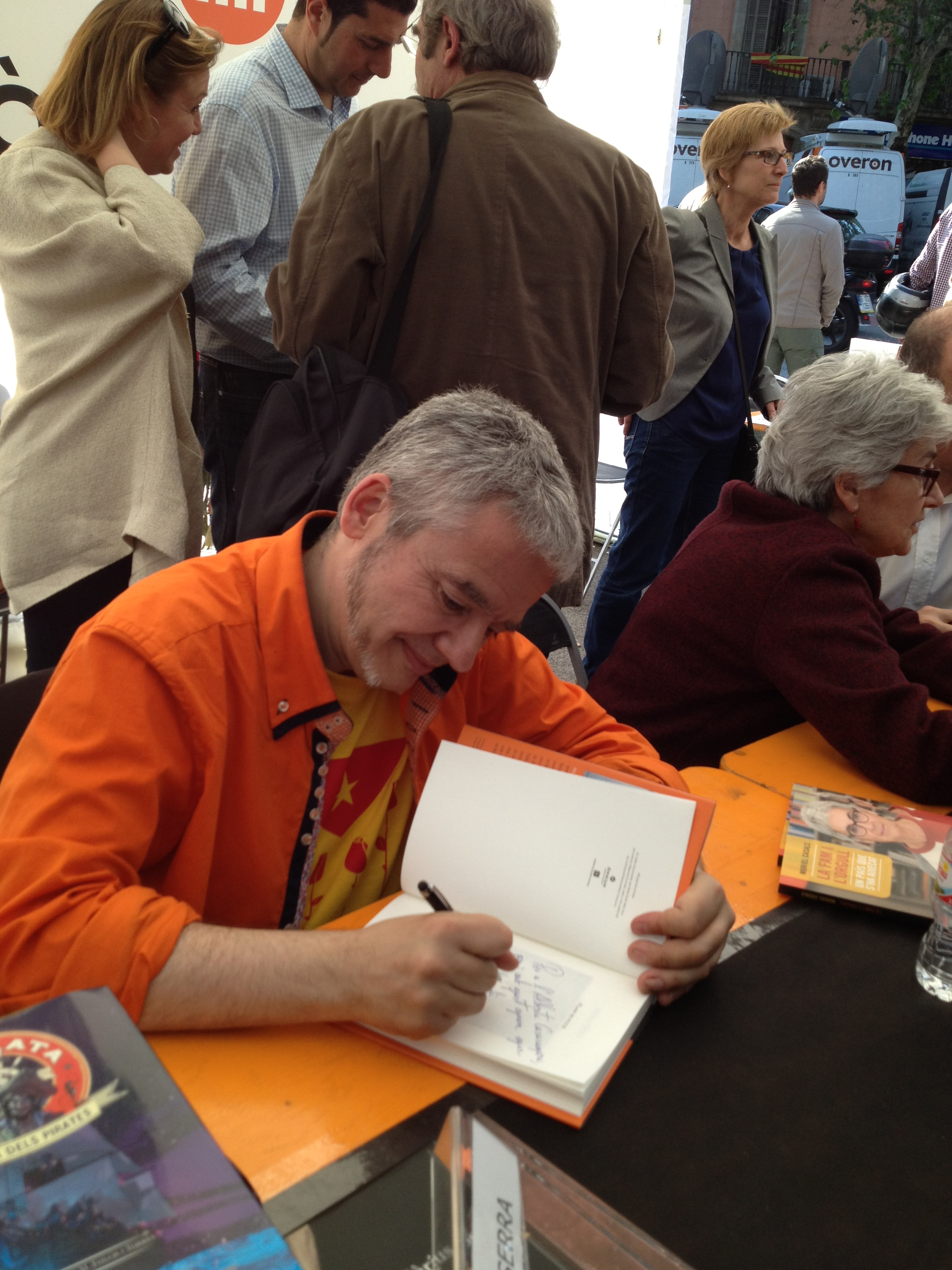 L'escriptor i lingüista Màrius Serra i Roig signant llibres a la diada de Sant Jordi de 2013 a la rambla Catalunya de Barcelona